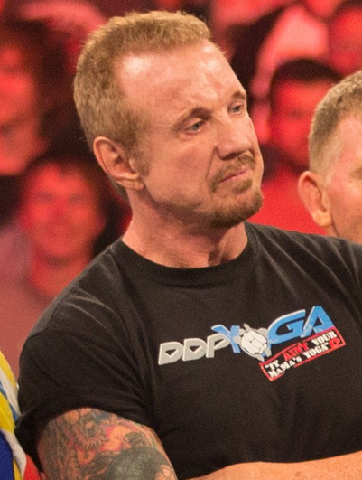 DDP a Raw 1000 (Ritaglio di File:Slater's veteran conquerors.jpg)